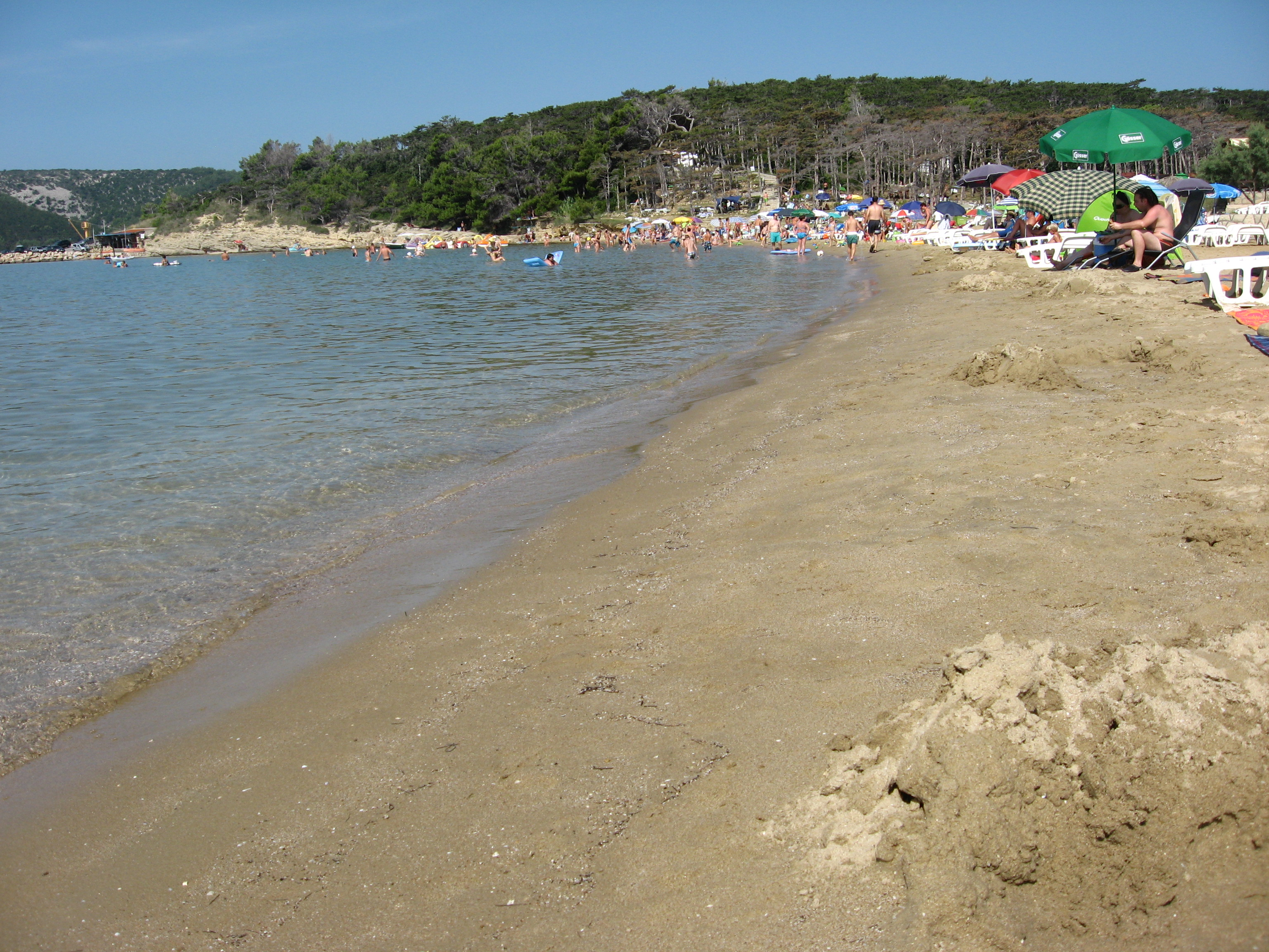 La spiaggia "Livačina" sull'isola di Arbe fotografata nell'estate 2014